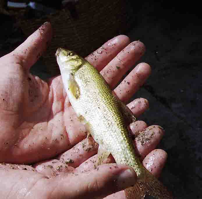 Barbus plebejus Tuscany